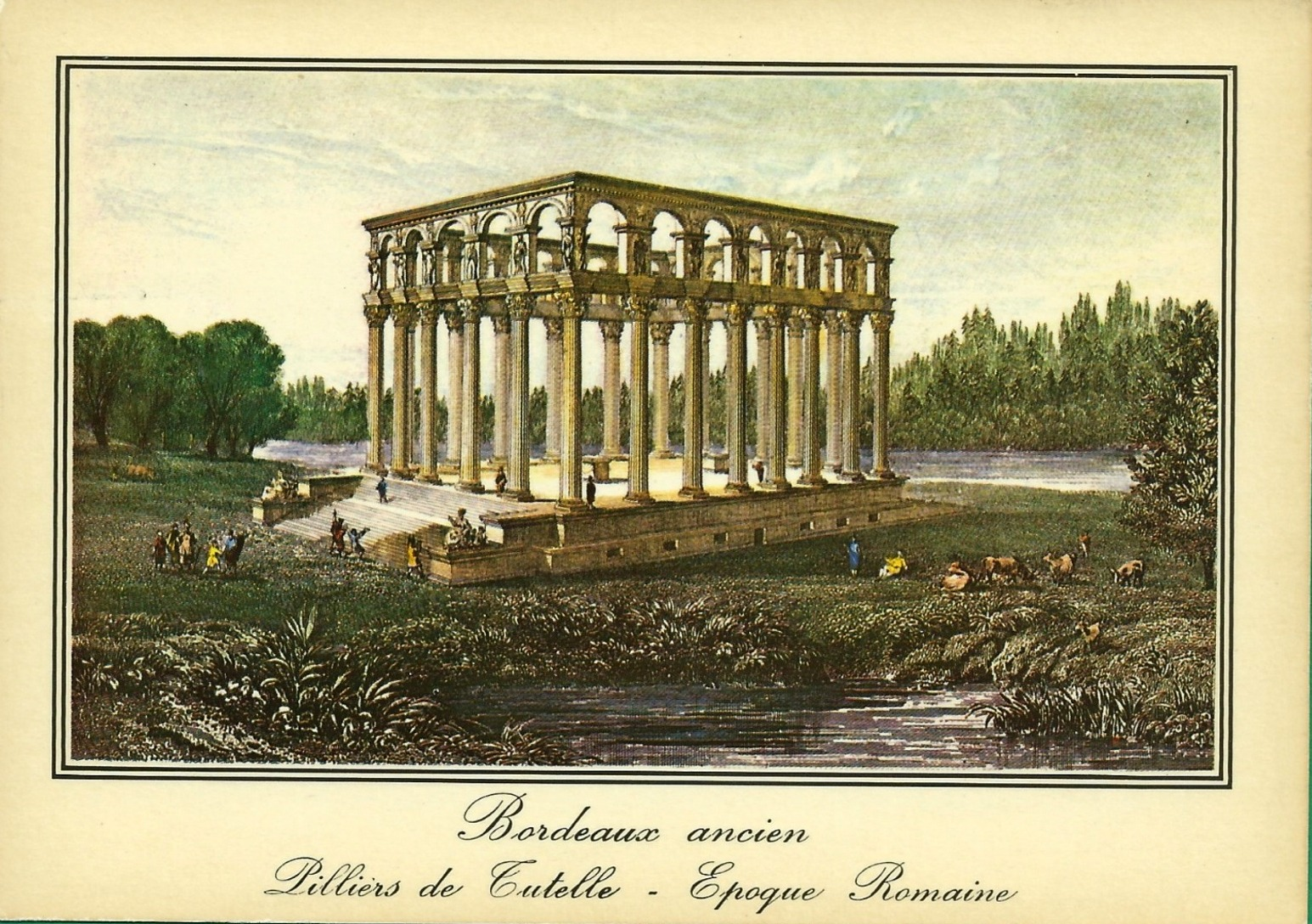 Old print of Bordeaux